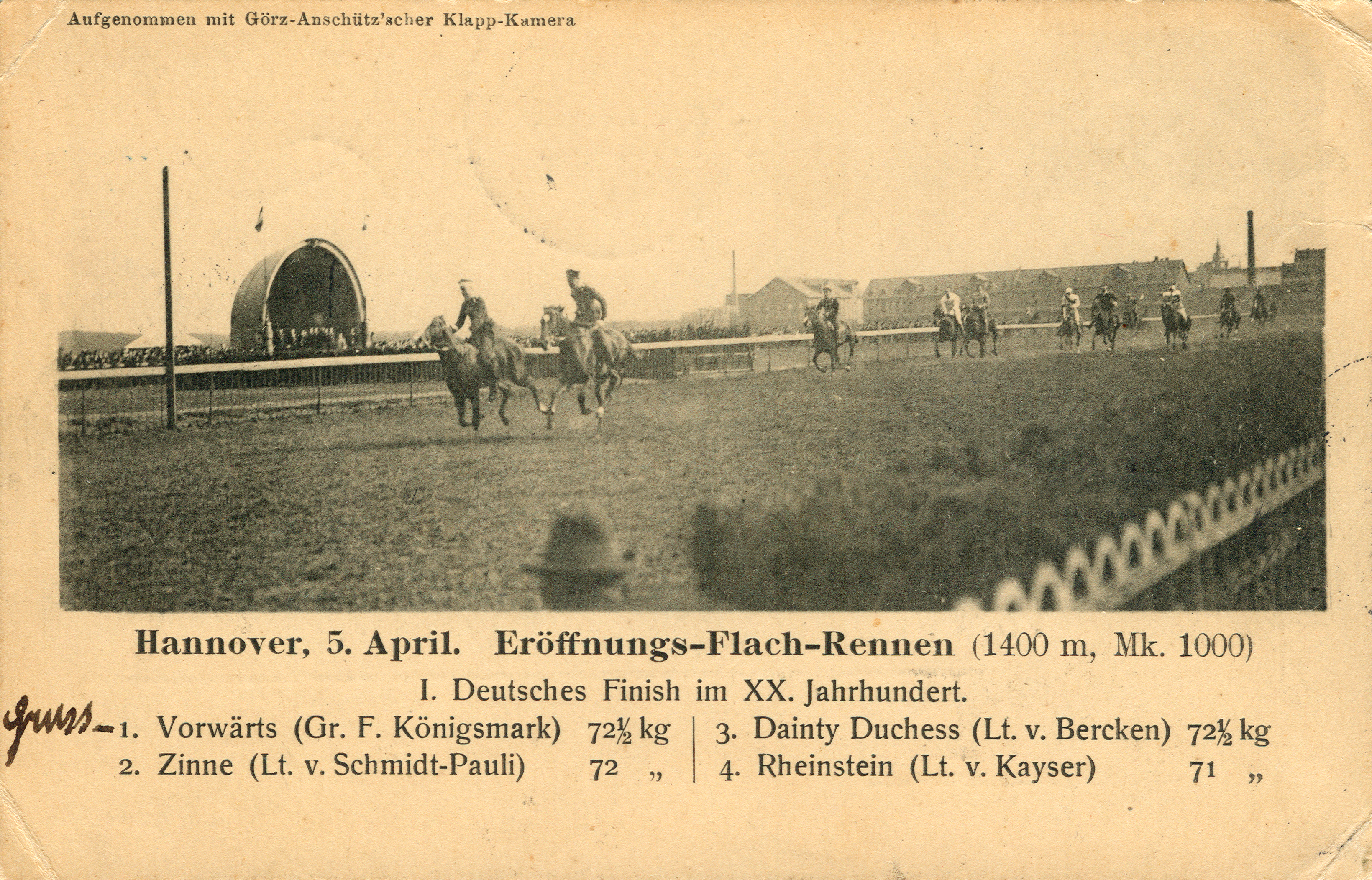 Laut dieser im Lichtdruck als Ansichtskarte reproduzierten Momentaufnahme vom 5. April 1900 stellt die zugrunde liegend Fotografie, „Aufgenommen mit Görz-Anschütz'scher Klapp-Kamera“ eine Situation während dem "Eröffnungs-Flach-Rennen über 1400 Meter bei einem Preisgeld von 1000 Mark dar, ausgerichtet vom Hannoverschen Rennverein, übrigens wenige Tage vor dem Tod des Vereinsgründers, General Heinrich von Rosenberg. Die Momentaufnahme hielt einen historischen Augenblick fest: „1. Deutsches Finish im XX. Jahrhundert“ und zeigt - vom Standpunkt des Bild-Reporters in Richtung der Zuschauertribüne, den Zieleinlauf der unten namentlich benannten Pferde mit ihren (möglicherweise nicht korrekt abgekürzten) Reitern: 1: Vorwärts (Gr. F. Königsmark), 2. Zinne (Lt. v. Schmidt-Pauli), 3. Danty Duchesse (Lt. v. Bercken; 4. Rheinstein (Lt. v. Kaiser. Das Reitgelände lag im Jahr 1900 noch auf der Kleinen Bult zwischen der - später erbauten - Stadthalle und der Bahnstrecke Hannover-Braunschweig, also auf dem Gebiet des heutigen Stadtparks. Auch der Standpunkt des Fotografen dürfte sich noch metergenau lokalisieren lassen, da die im Hintergrund sichtbaren Gebäude schon jetzt einen ersten Anhaltspunkt bieten. Von Interesse ist auch der handschriftliche "Gruß" mit Bezug auf den Sieger des Rennens: Dieser dürfte der "Baronin Wimpffen in München (siehe die Adressseite, siehe unten) mit der nur wenige Tage nach der Aufnahme gedruckten Postkarte eine nur wenig verhüllte Zuneigungs-Erklärung gesandt haben durch die Art der gedrehten Briefmarke. Leider hatte der Graf dabei auch - sicherlich absichtlich - die auf der Adressseite vorgedruckten Verlagsangaben für den "Goldsch..." - Verlag überklebt, so daß wir hier noch ein weiteres Forschungsgebiet eröffnet haben ...